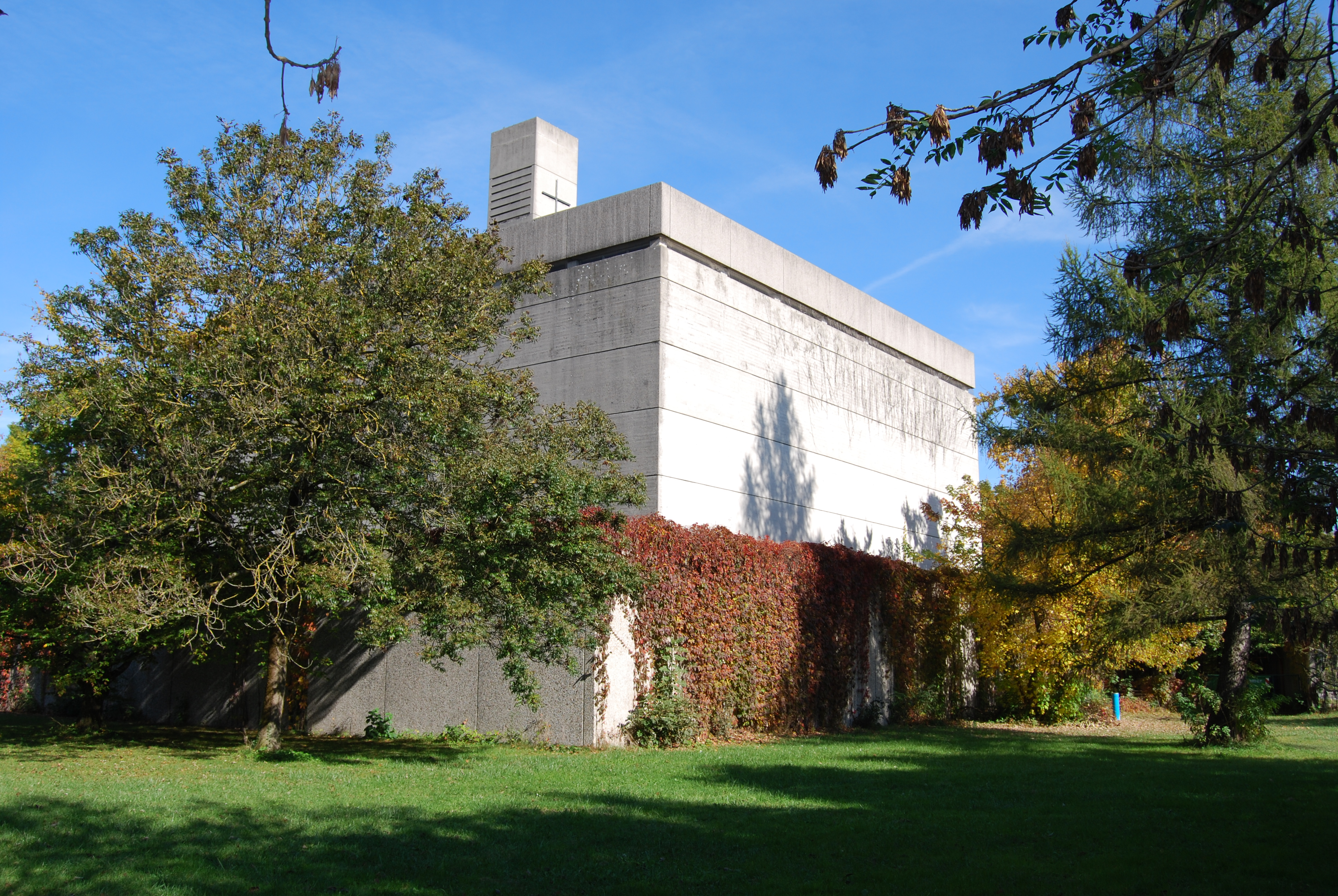 St. Mauritius in München-Moosach, Blick von Süd-Westen